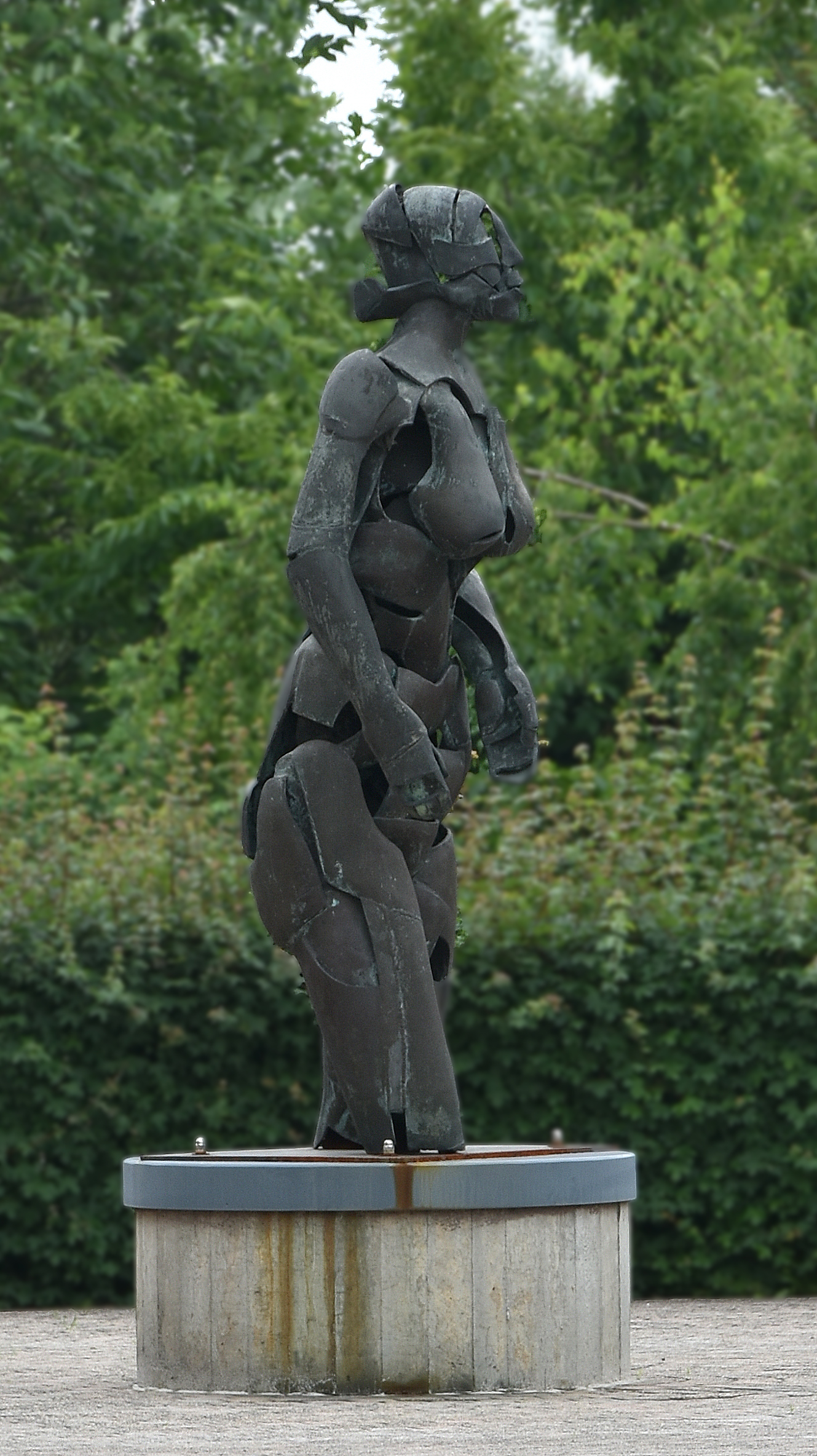 Rik Poot (1924-2006) Hulde aan mijn grootmoeder - Provinciehuis Hasselt